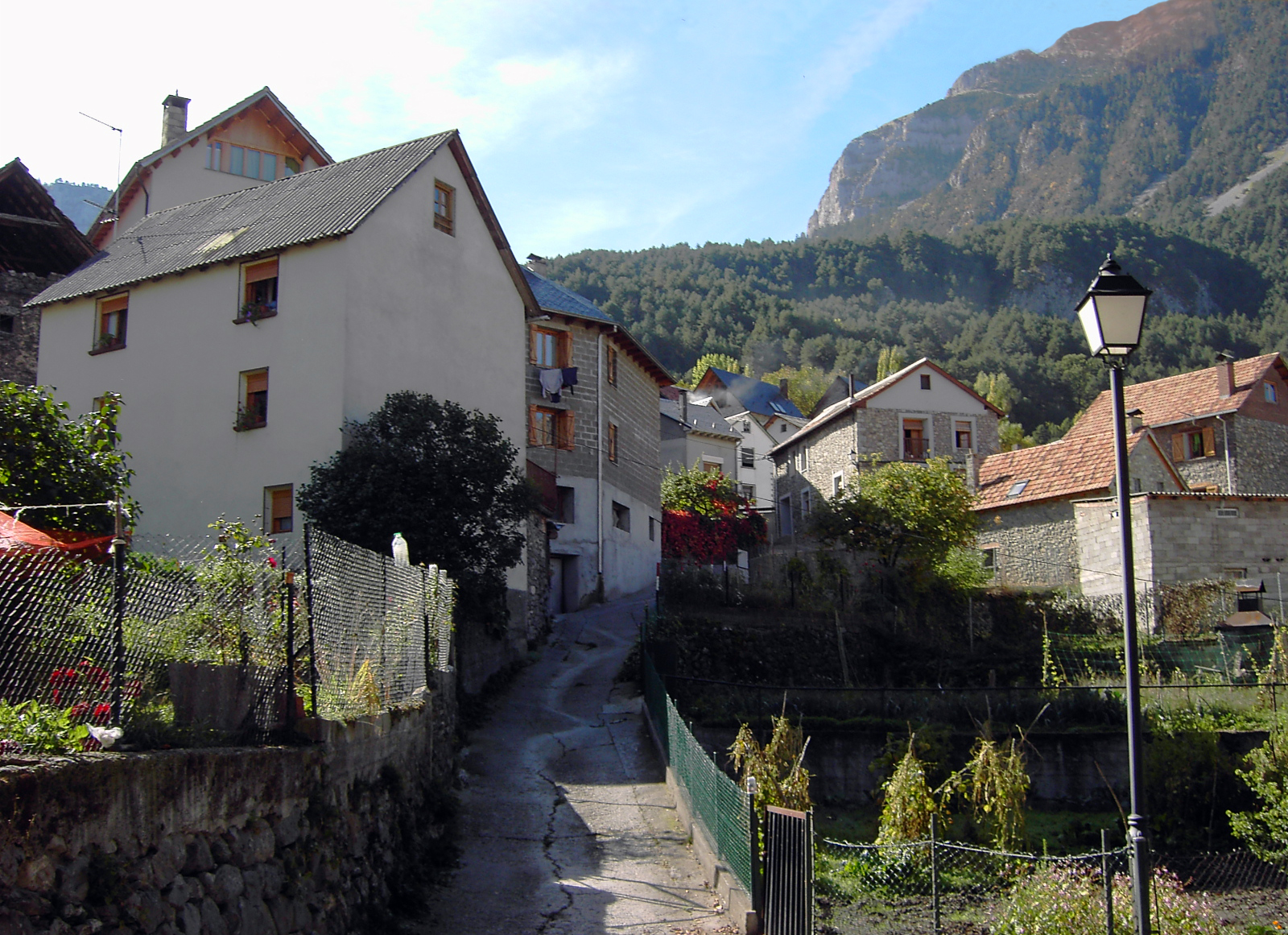 Plano general de la población de Saravillo, en la parte baja del Valle de Gistau.